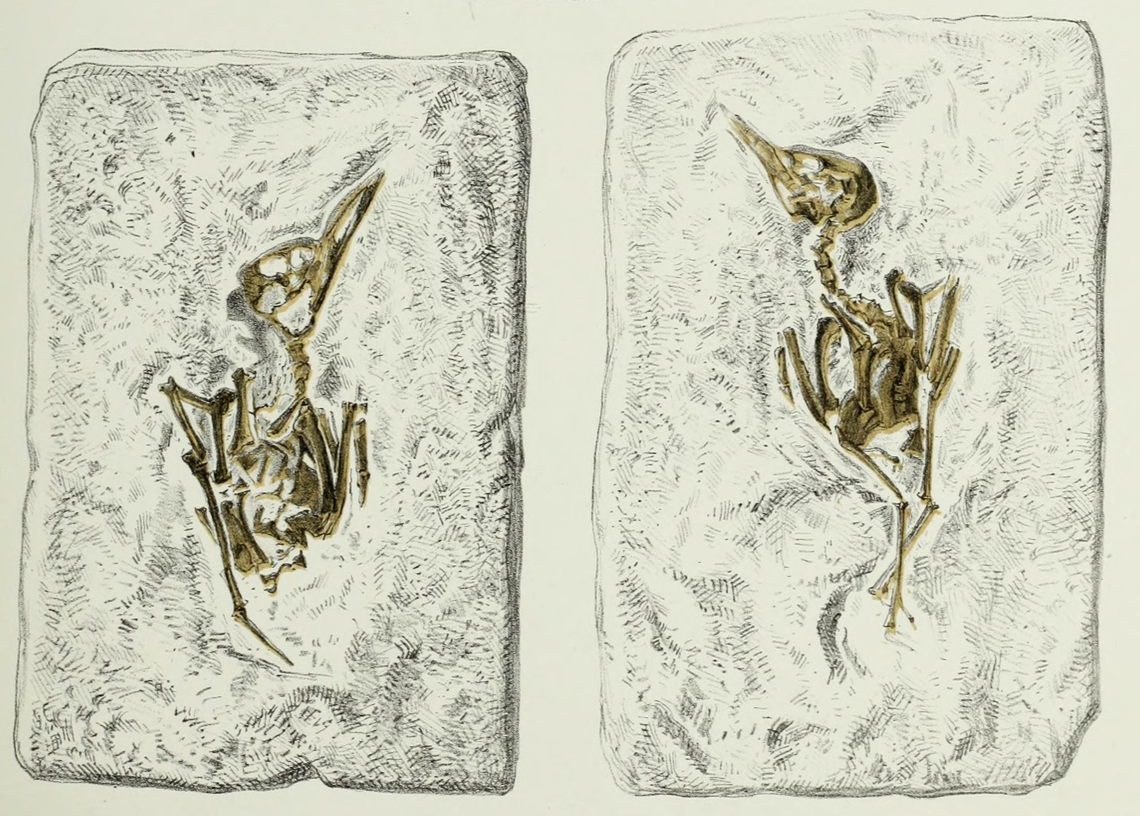 « Sitta cuvieri » fossil